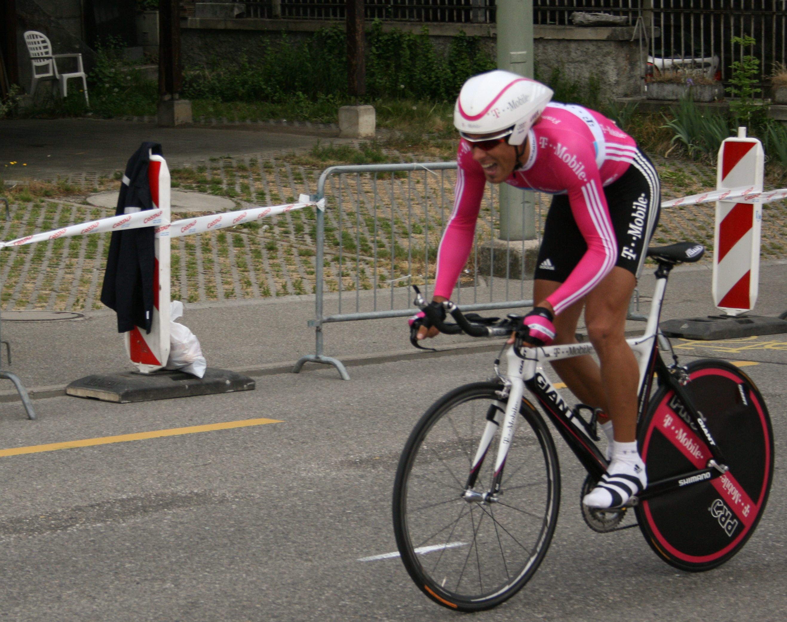 Frantisek Rabon prologue du Tour de Romandie 2007